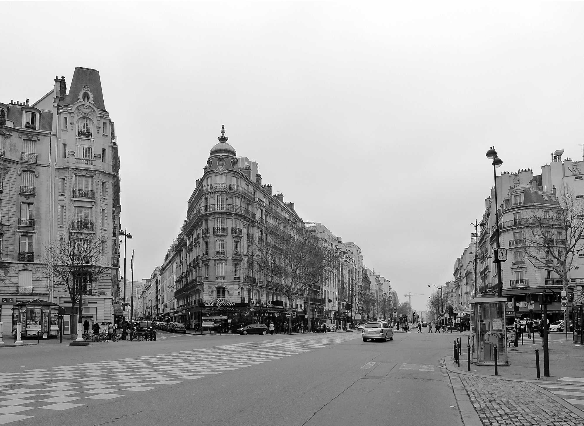 Place Pablo-Picasso - Paris VI et XIV